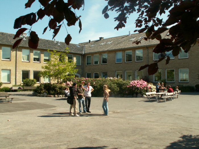 Gammel Hellerup gymnasium